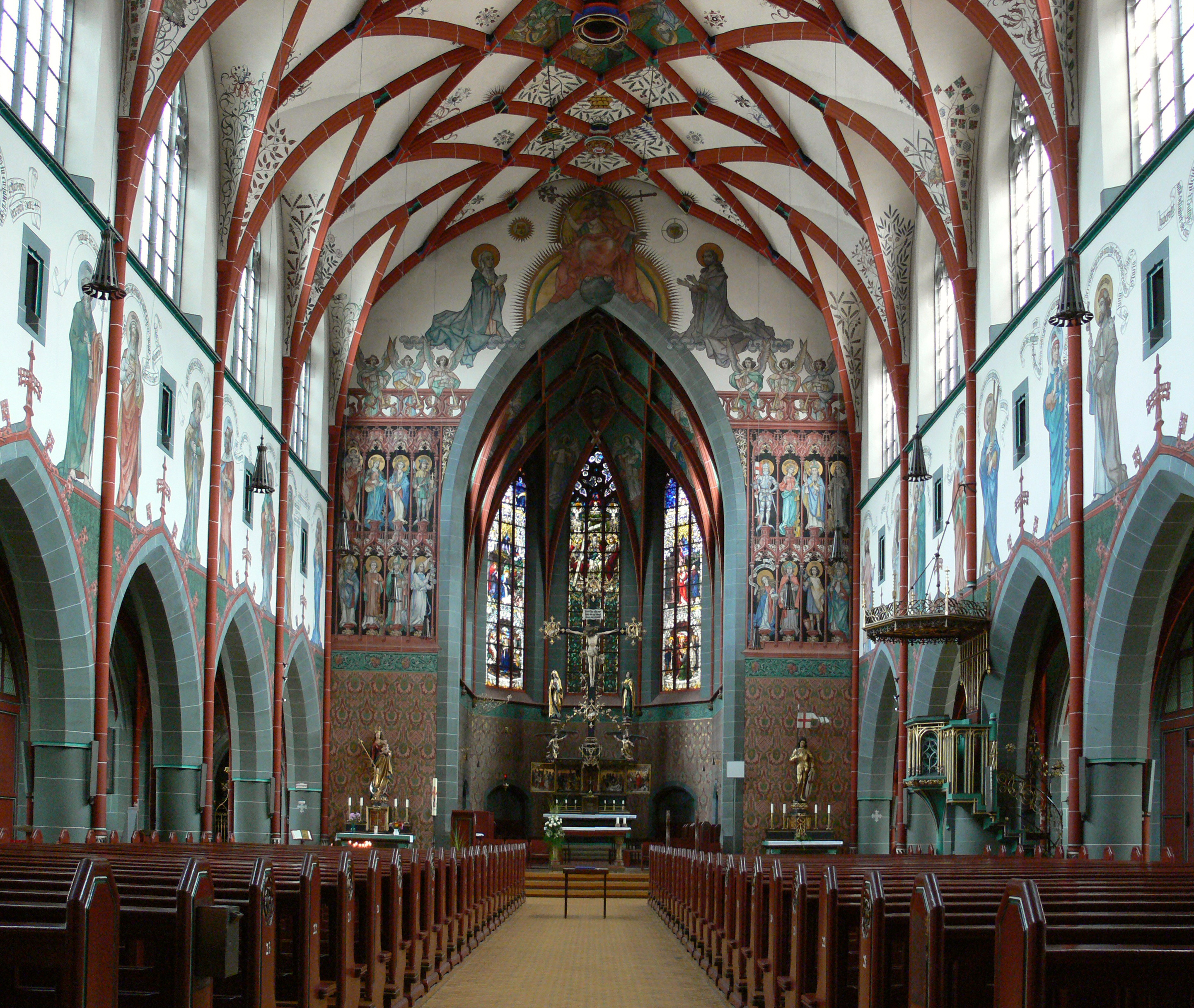 Katholische Pfarrkirche St. Georg, Ulm (Donau), ehemalige katholische Garnisonskirche Blick durch das Hauptschiff zum Chor